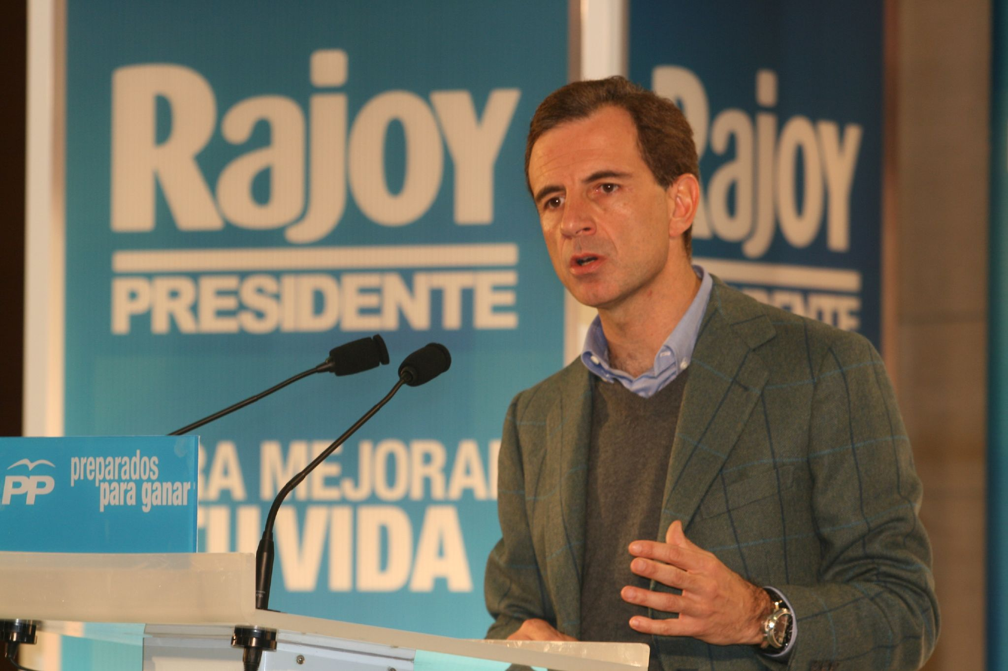 Juan Costa en las jornadas Para mejorar tu vida organizadas por el Partido Popular celebradas el 2 de noviembre de 2007 en Madrid.